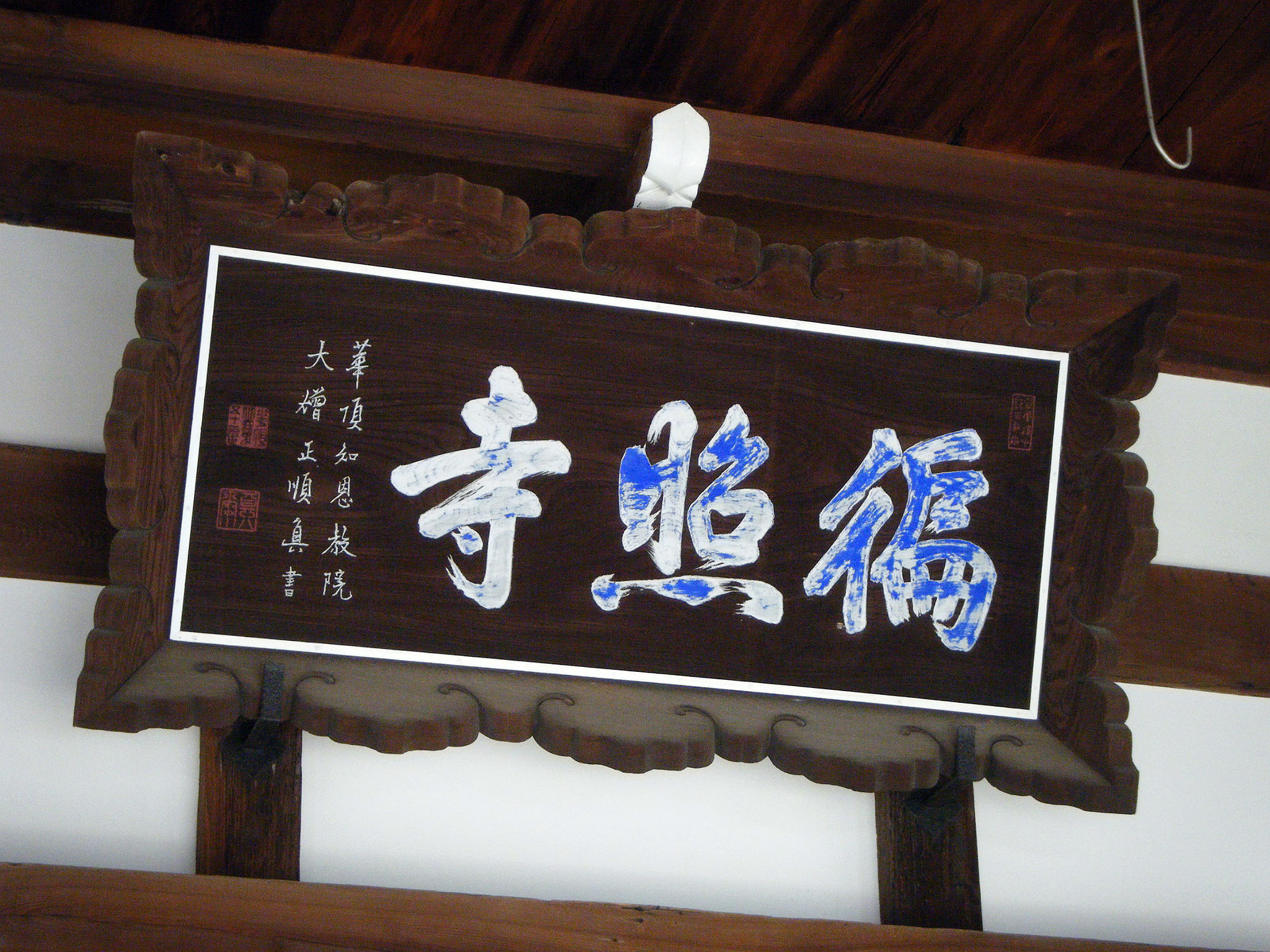 如来院 本堂の扁額 兵庫県尼崎市